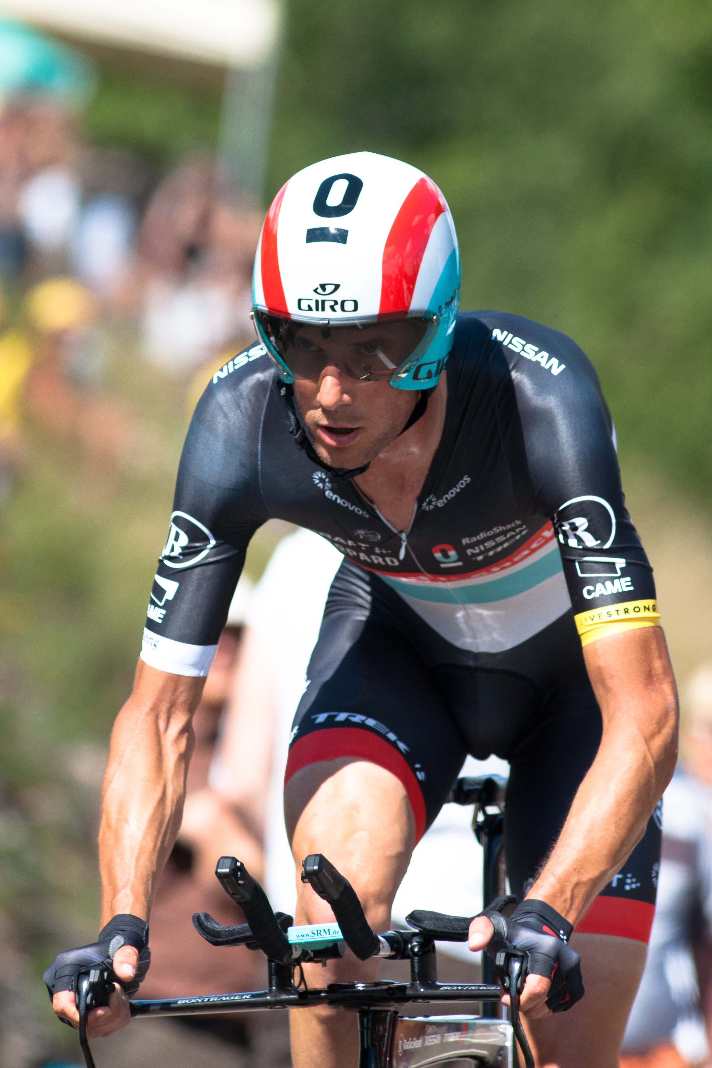 Frank Schleck - TDF 2012